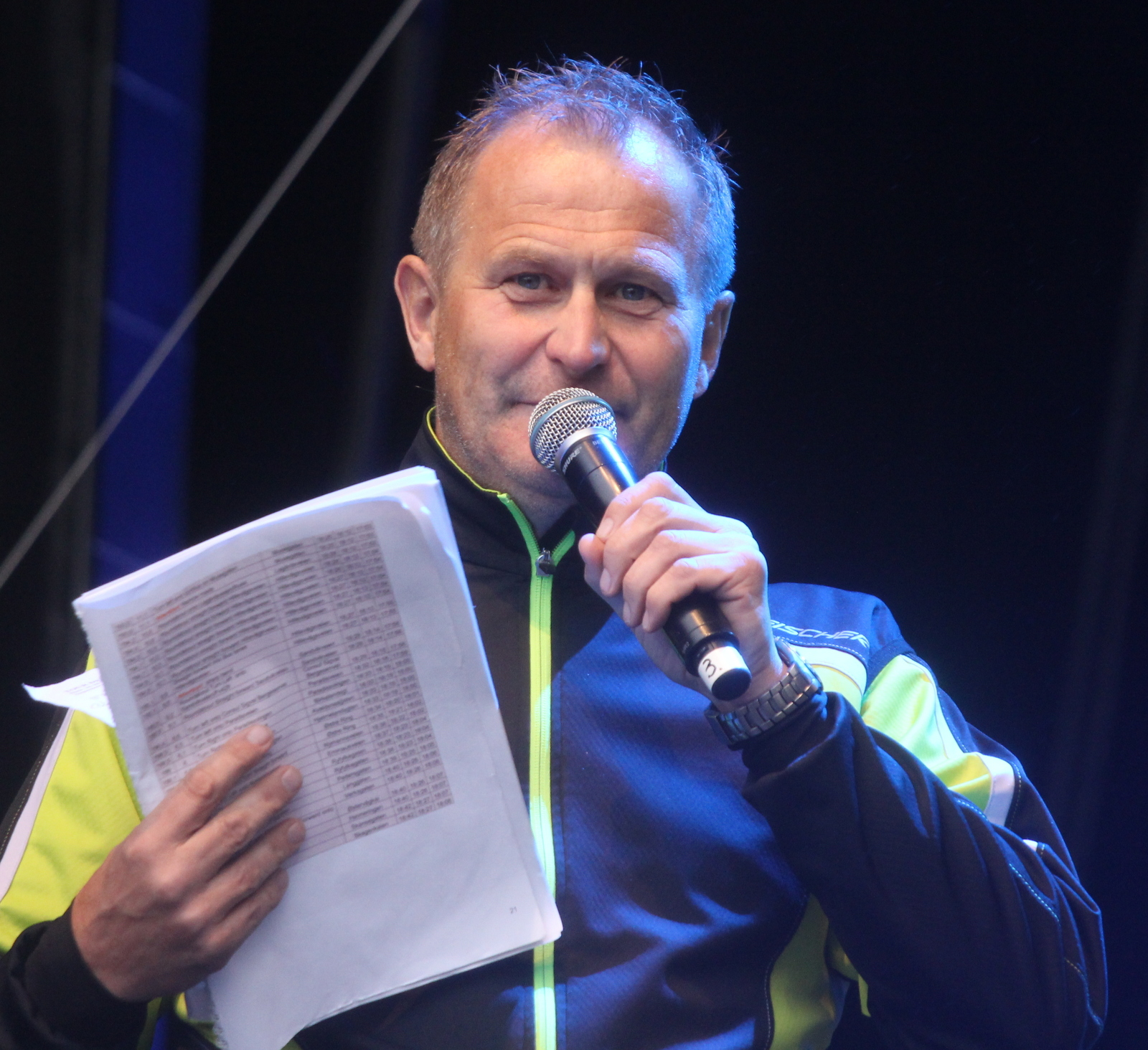 Kjell Erik Kristiansen under Tour des Fjords